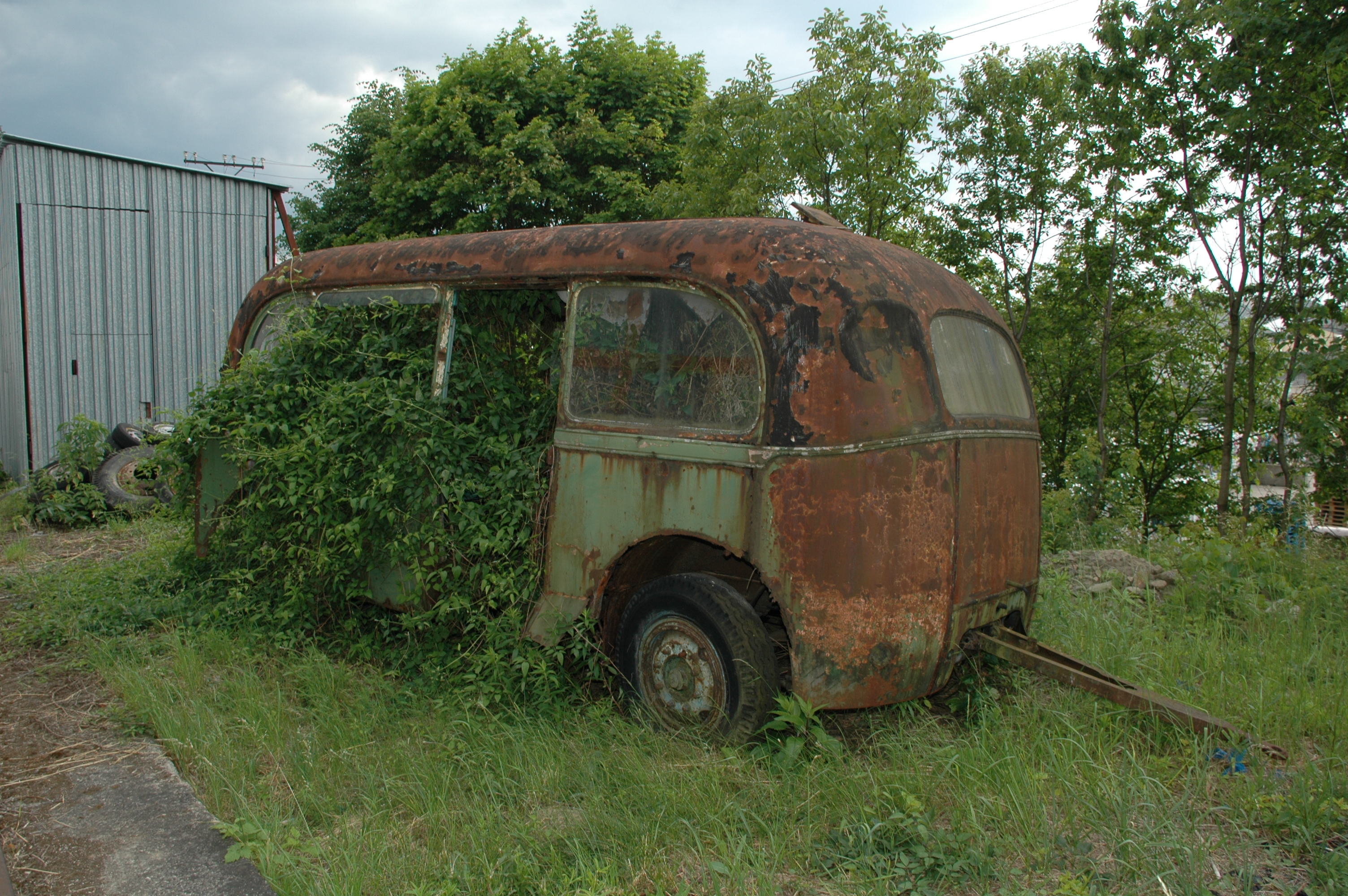 Za halou v depozitáři TMB Líšeň